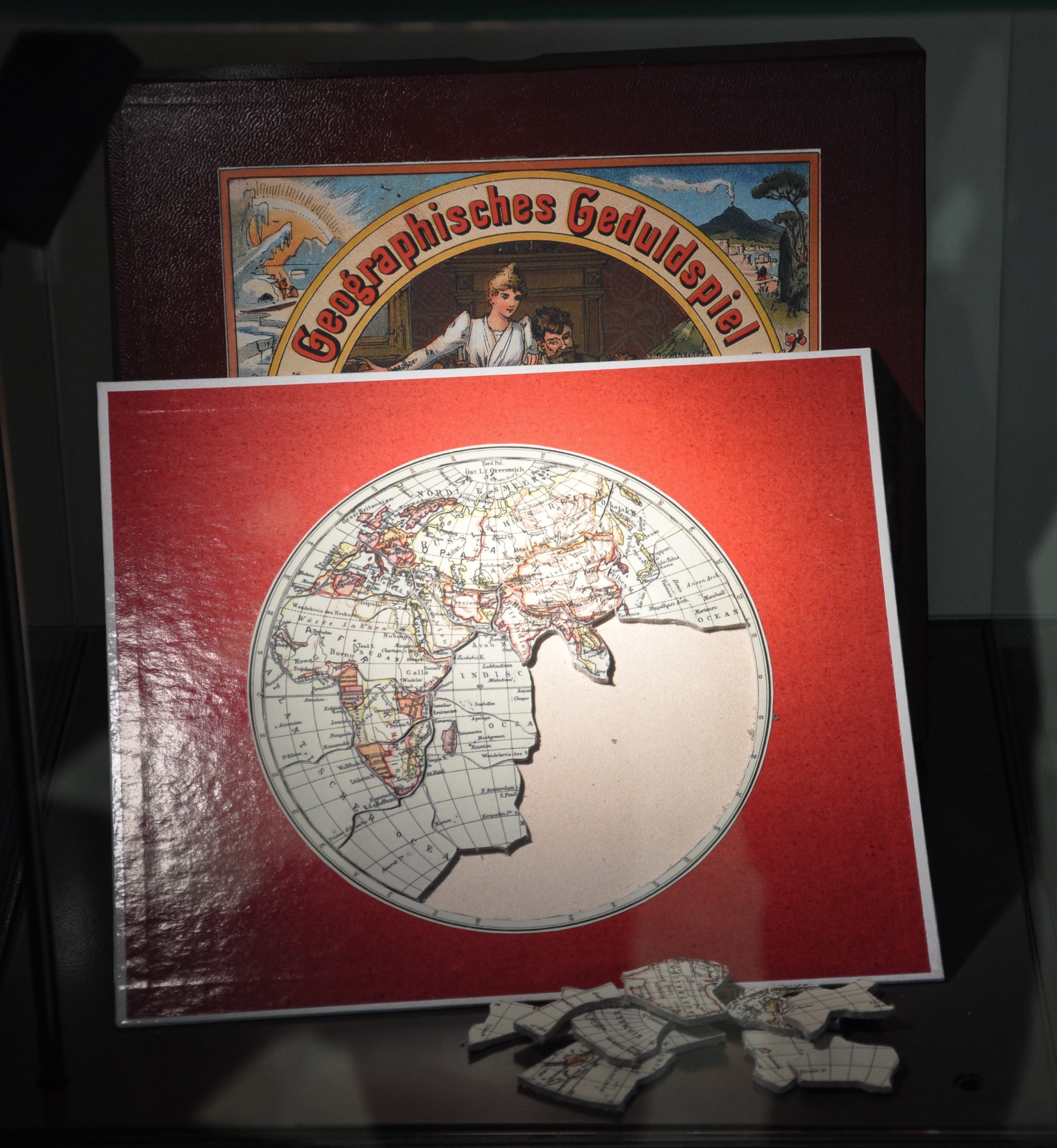 Ravensburg, Museum Ravensburger Geographisches Geduldspiel (frühes Puzzle), 1891 von R. Schweizer Museum Ravensburger LocationRavensburg, GermanyCoordinates47° 46′ 49.08″ N, 9° 36′ 55.95″ E Established2010 Web page Authority control : Q18760637 institution QS:P195,Q18760637